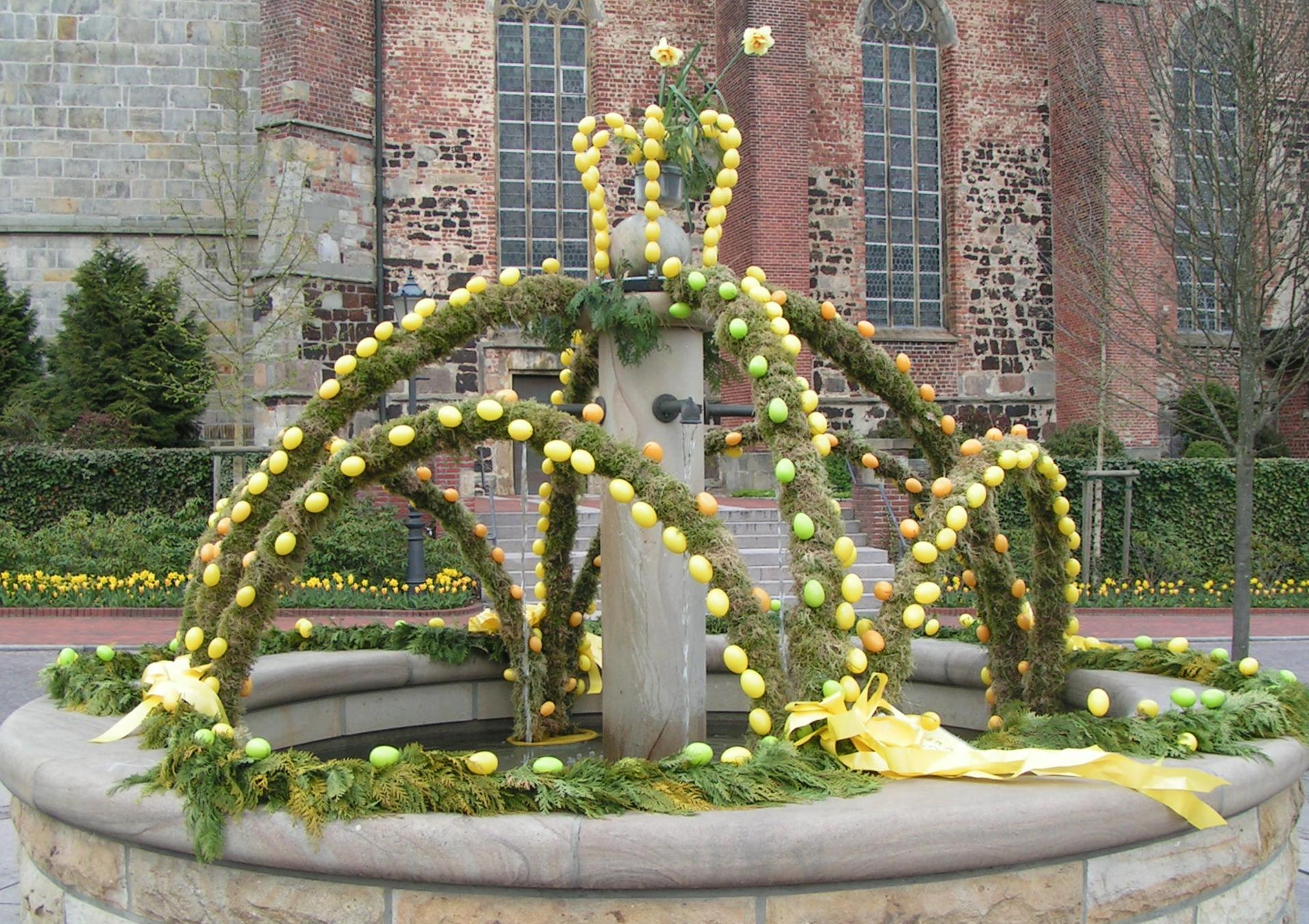 Osterbrunnen gegenüber der Pfarrkirche St. Vincentius Haselünne